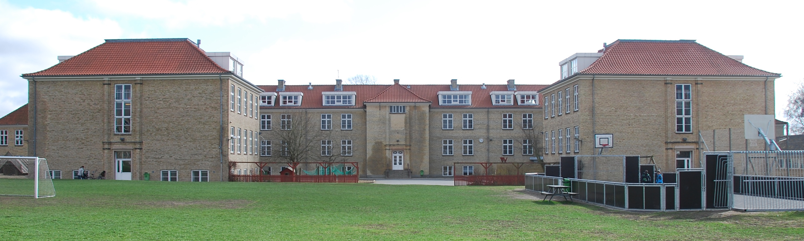 Vestre Skole i Viborg.